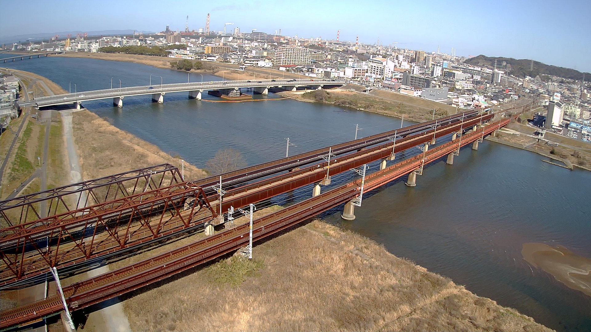 大分川に架かる滝尾橋（奥）手前は日豊線と豊肥線大分川橋梁